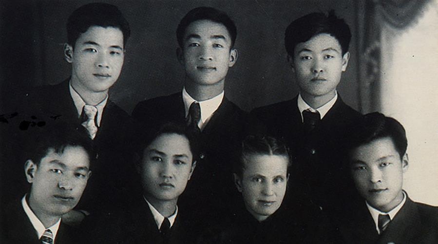 1949年6月1日，李鹏（后排左）在苏联伊万诺沃动力学院补习数理化及俄文时与俄语教师费德洛娃（前排左三）及同学合影。